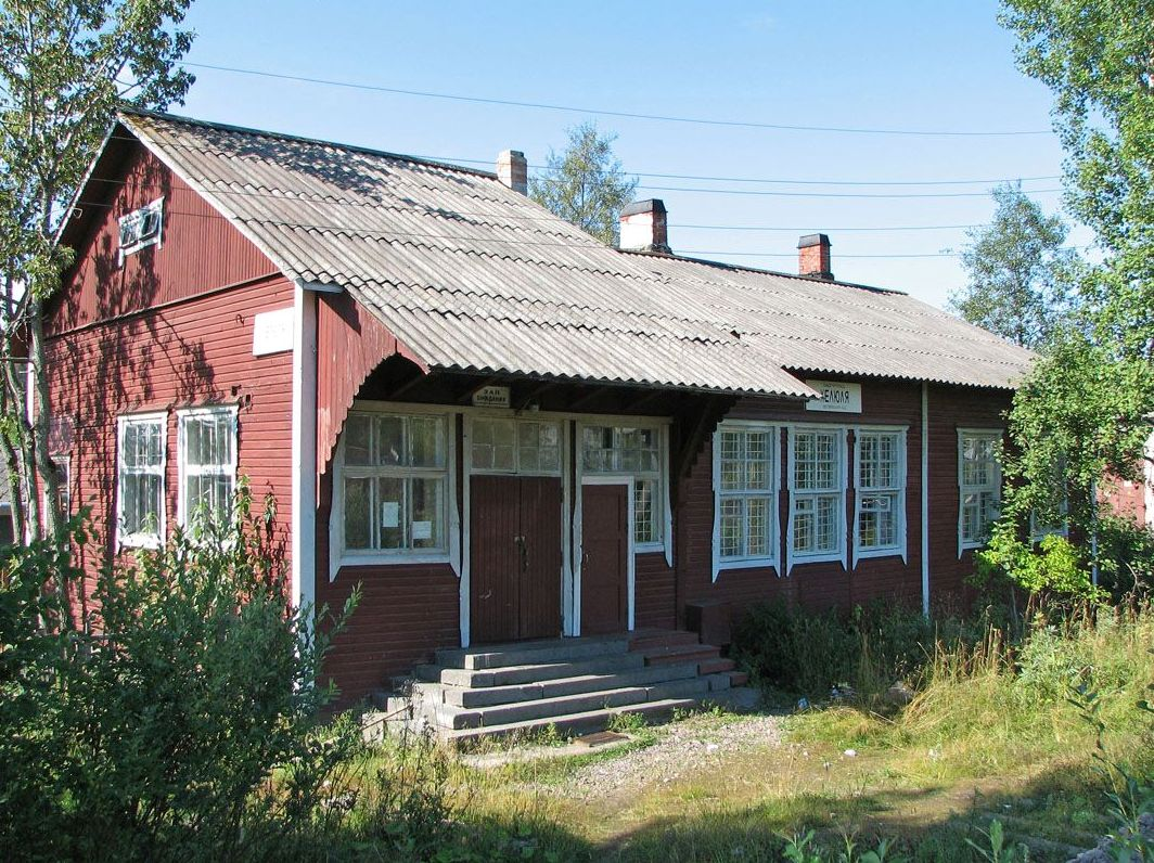 Хелюля